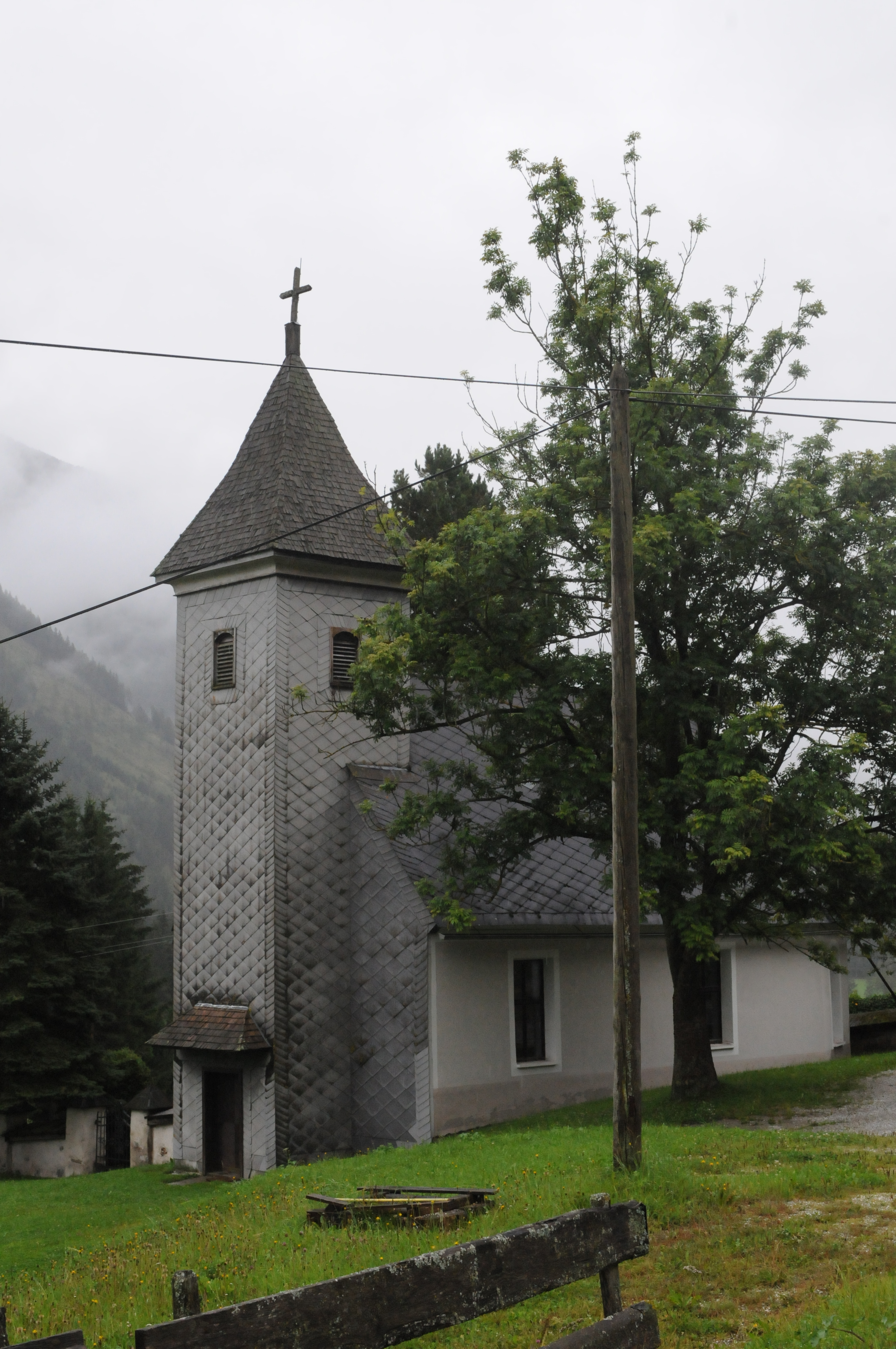 Glaubenskirche Sankt Johann am Tauern